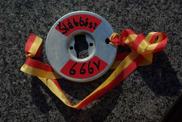 Hörspielpreis Slabbesz, am Bande in den Farben der Landesfahne des Burgenlandes